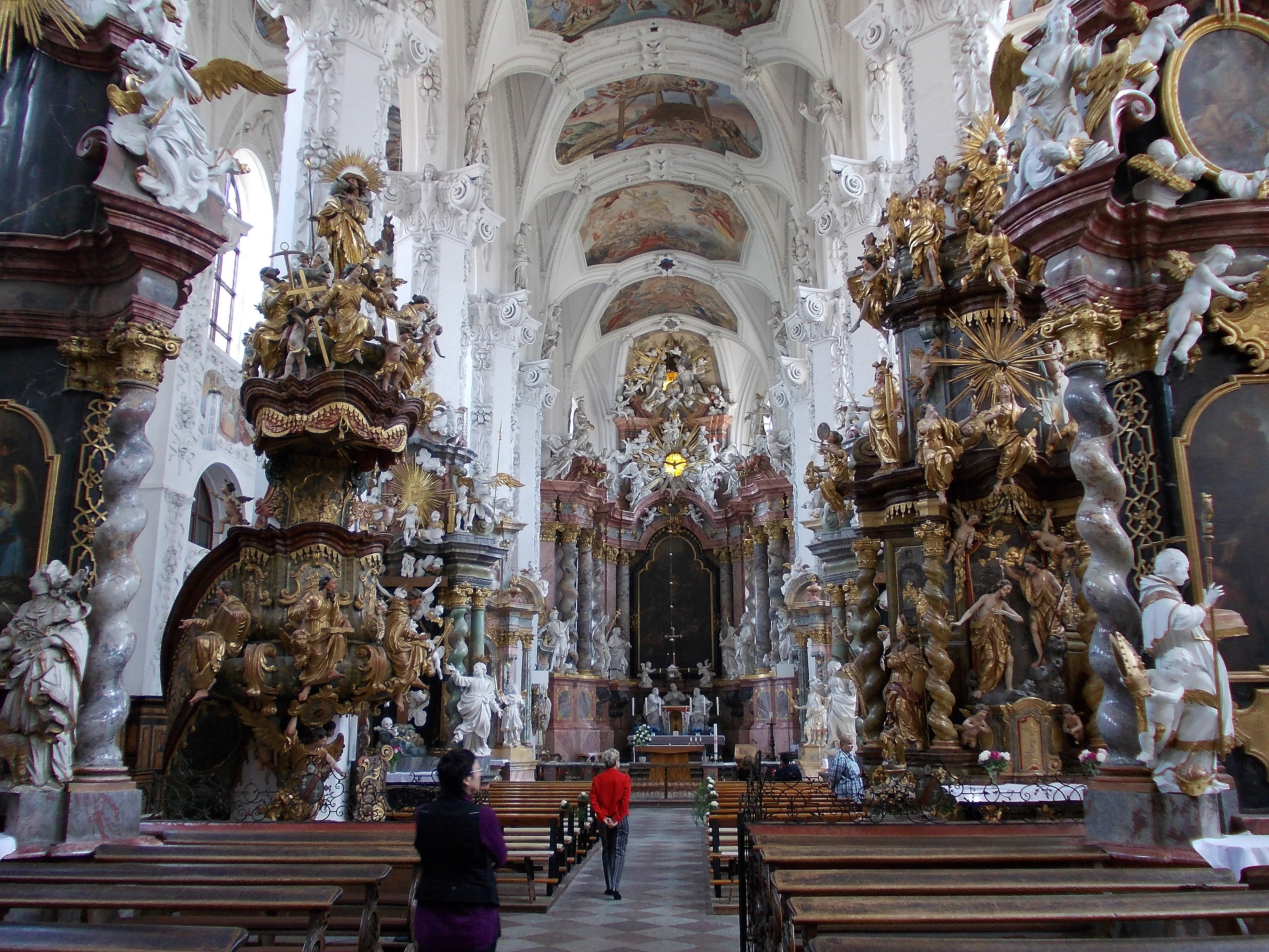 Klosterkirche Neuzelle - Süddeutscher Barock in Brandenburg